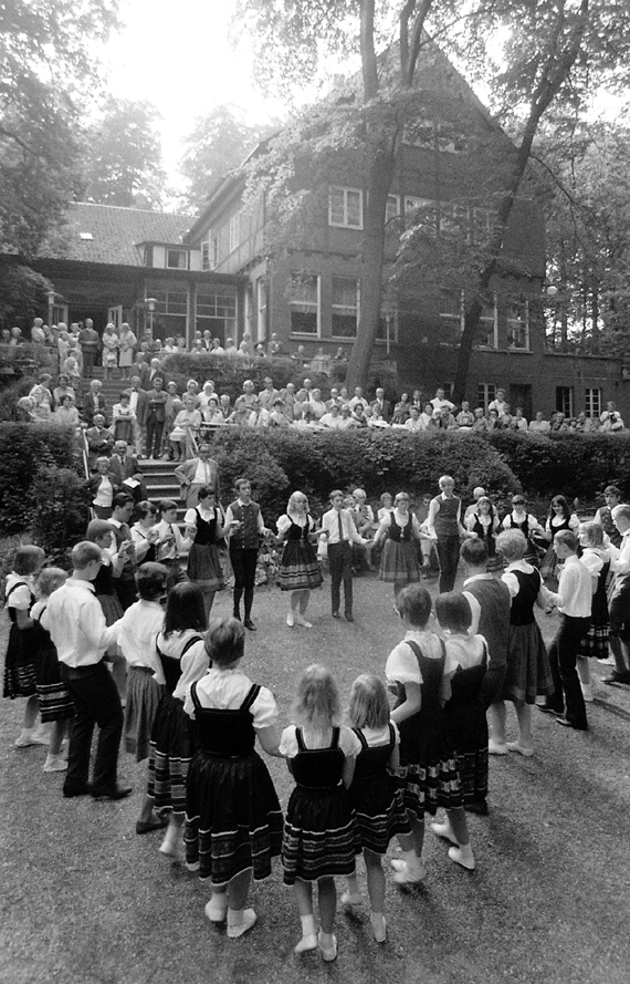 The Marienberg Festival 1 July 1967 near "Waldgaststätte Marienberg" in Lower Saxony. de: Marienbergfest des Heimatbundes Niedersachsen am 1. Juli 1967 vor der Waldgaststätte Marienberg bei dem Schloss Marienburg.